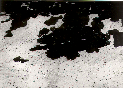 Coupe d'une piqure de corrosion sur un alliage d'aluminium type 2000, microscope optique, grossissement X200